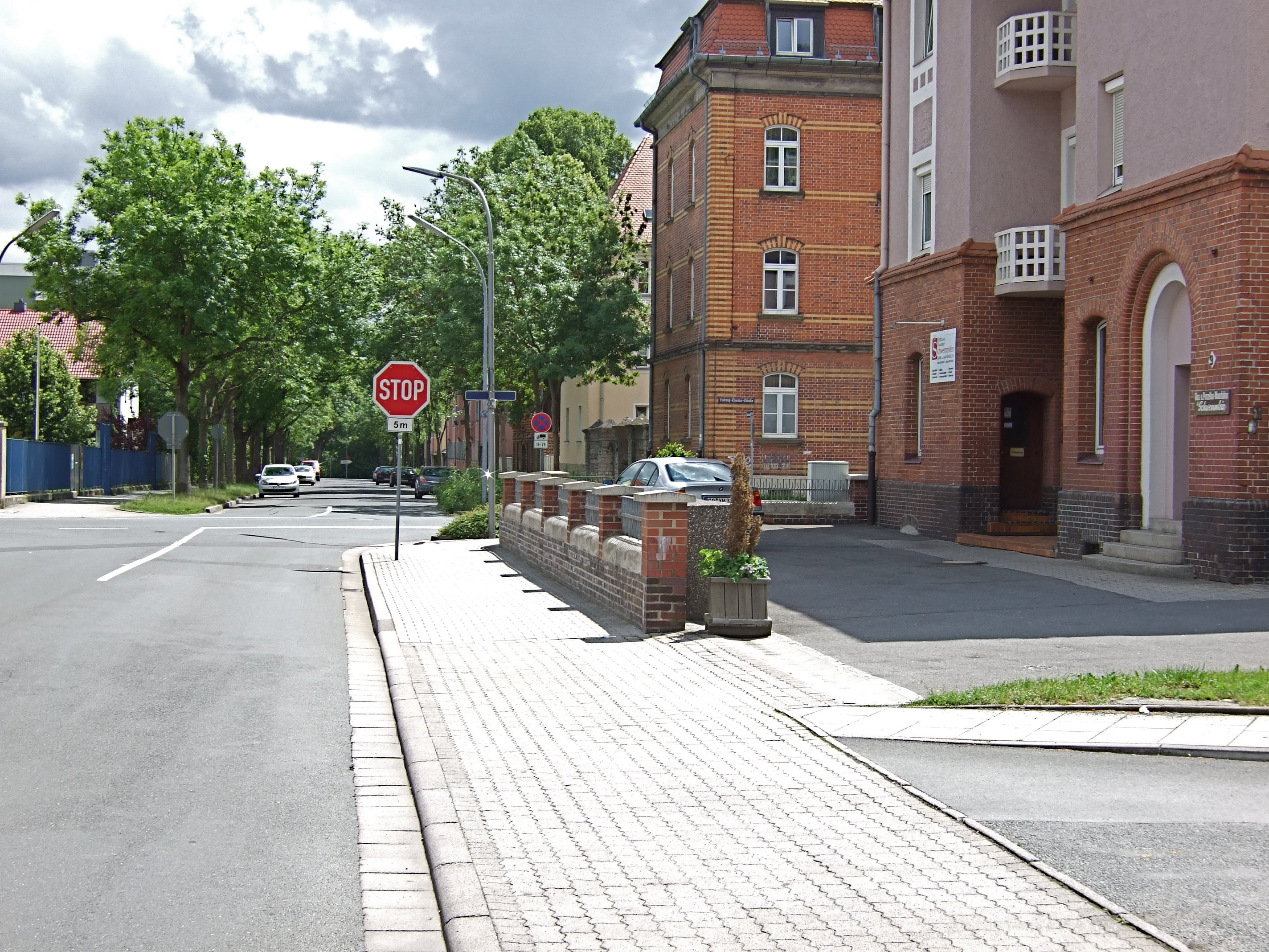 Leibnitzstraße Bayreuth